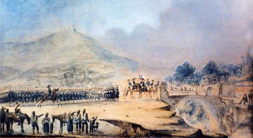 Paso del Batallón Numancia al lado independentista, acuarela pintada por el libertador Bernardo O'Higgins.